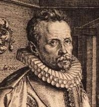 Abraham van GoorleLatina: Abraham Gorlaeus